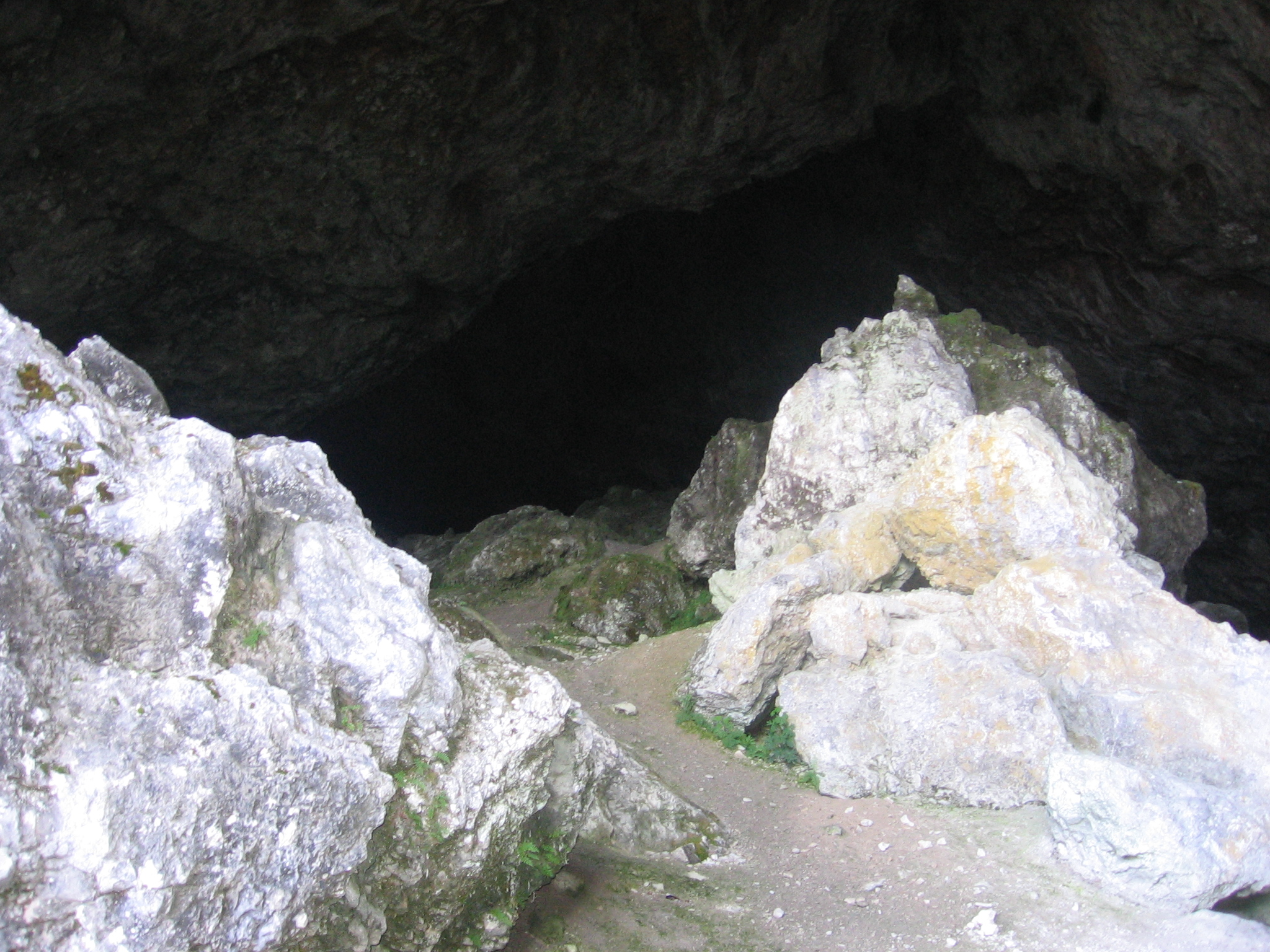 Potočka zijalka entry